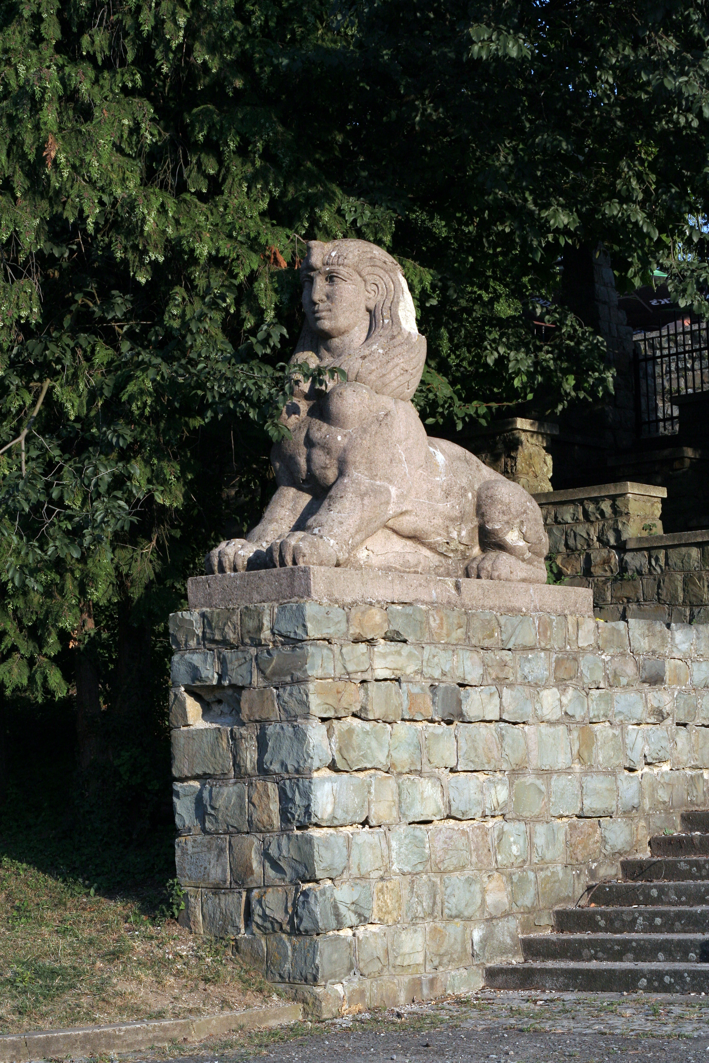 sfinga pored stepenica, na bočnoj strani hotela